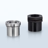 Spannsatz Typ SSE (Schnellspannelement) kann radial durch eine Mutter gespannt werden. Welle-Nabe-Verbindung